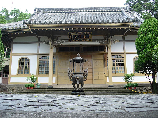 Old Pu-Zi Temple in Beitou, Taipei, Taiwan.